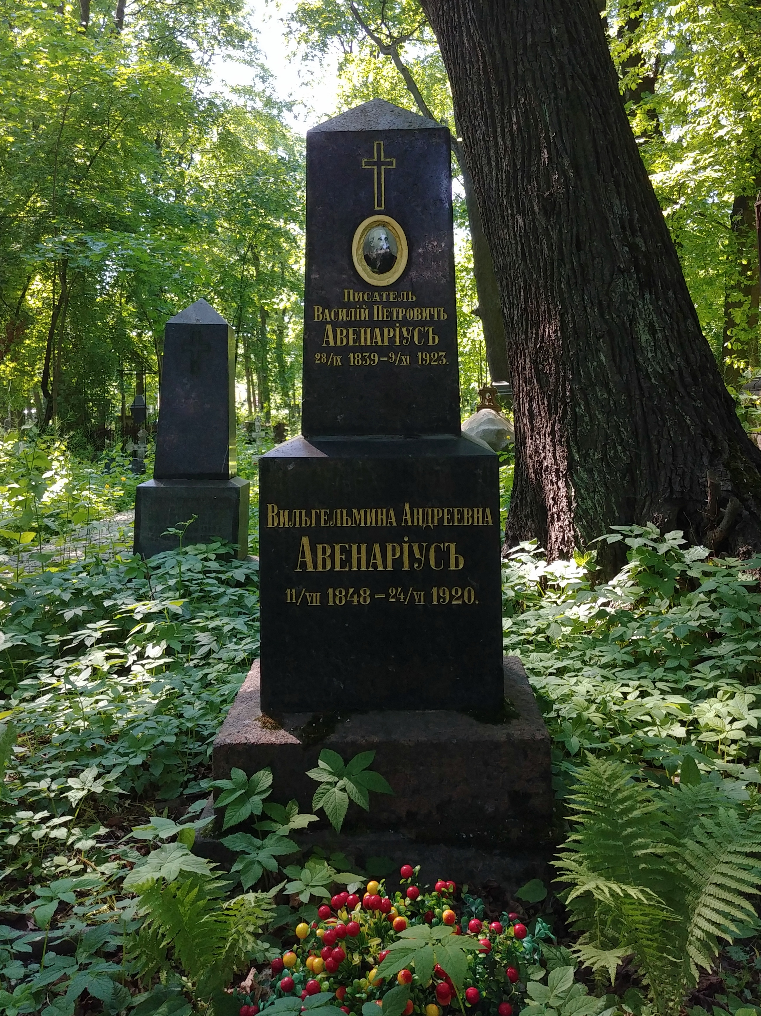 Могила Авенариуса Василия Петровича на Смоленском лютеранском кладбище